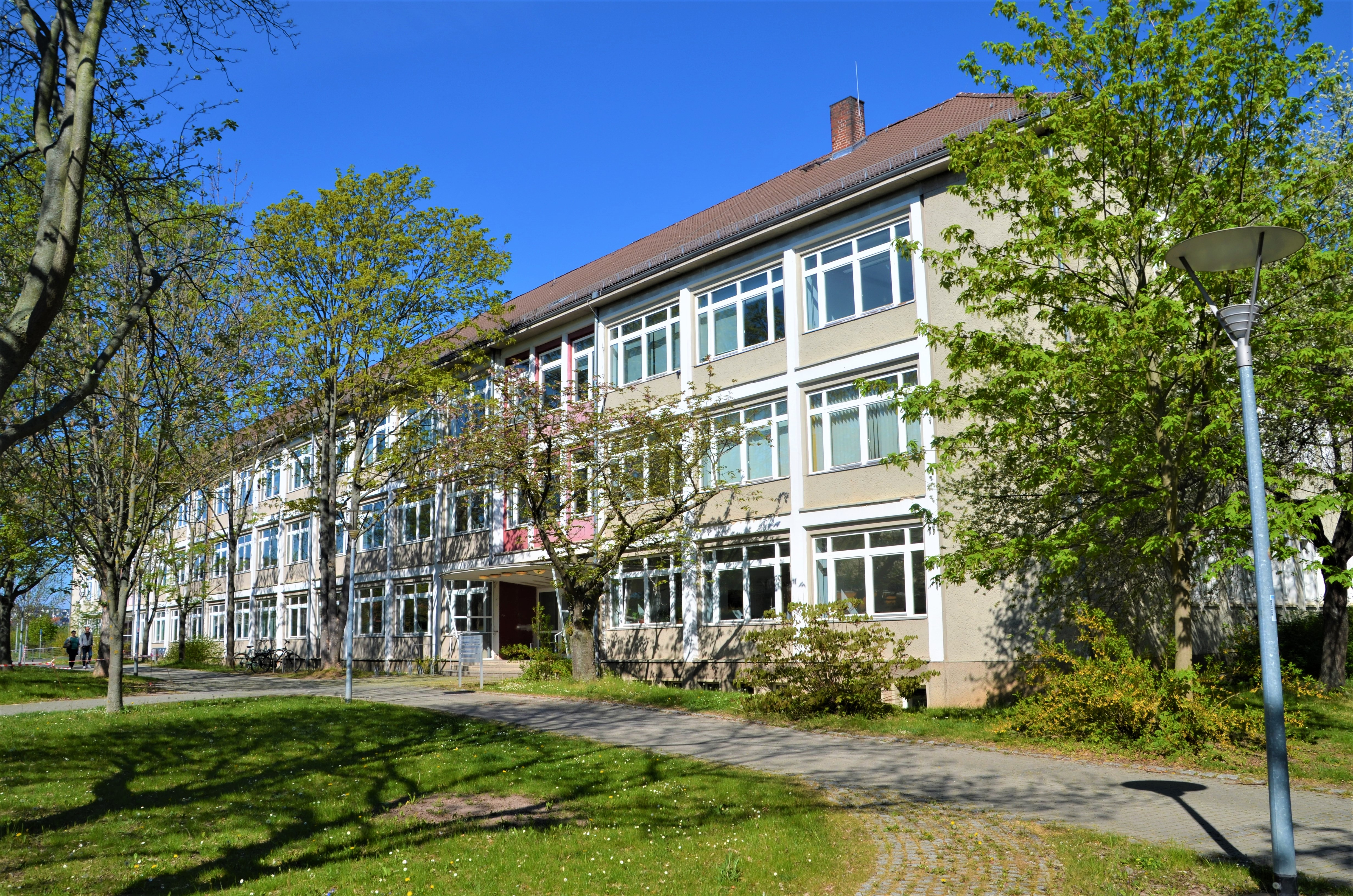 Lehrgebäude 2, Campus, Universität Erfurt von Südost